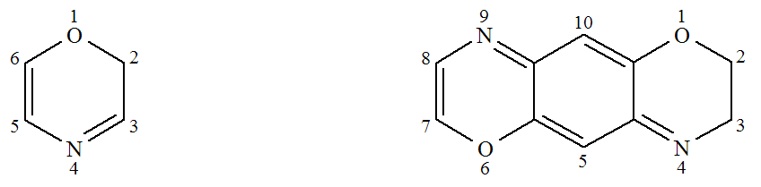 Aufbau Dioxazin